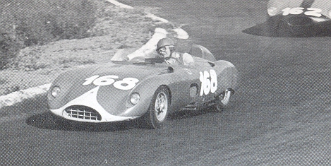 Bandini 750 sport internazionale "saponetta" tratta dal libro Bandini (storia e automobili di Ilario Bandini)